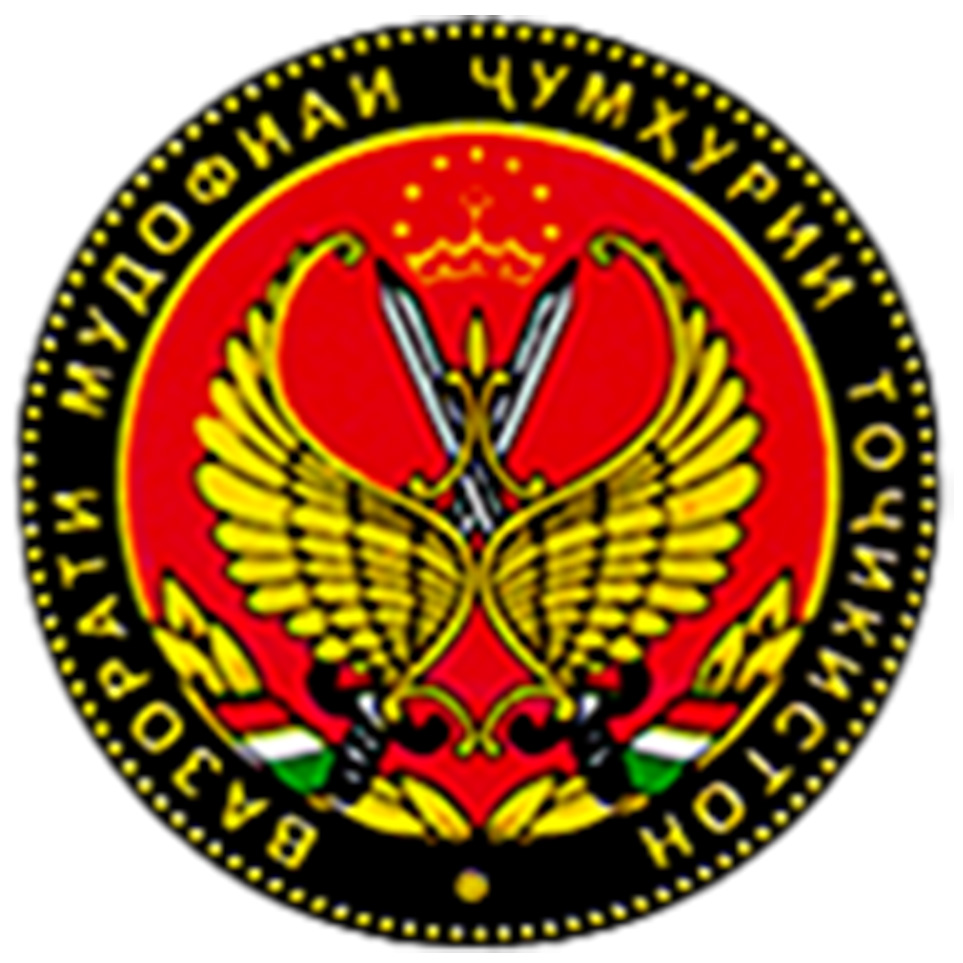 Тоҷикӣ: Нишони Вазорати мудофиаи Ҷумҳурии Тоҷикистон